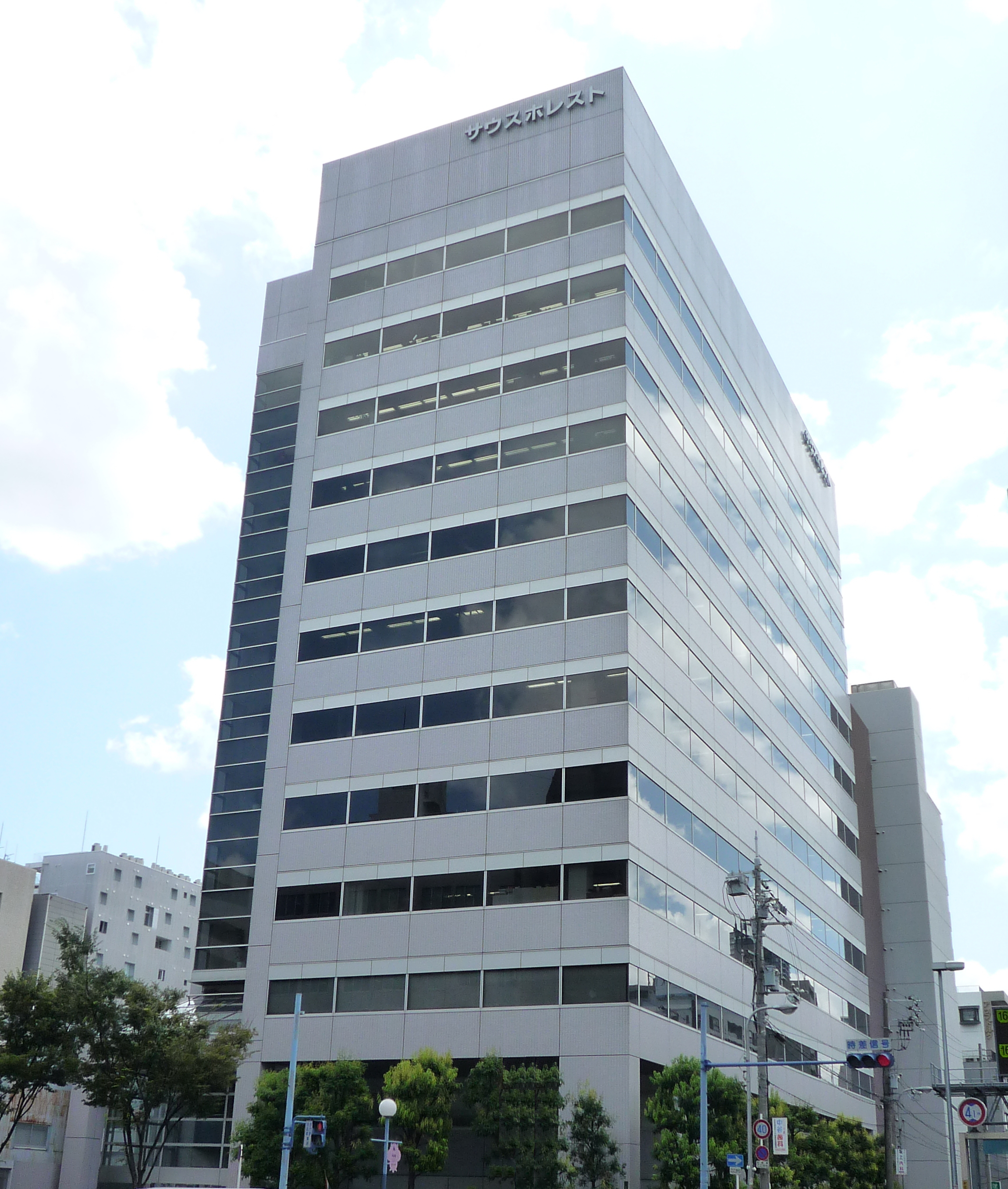 honsha